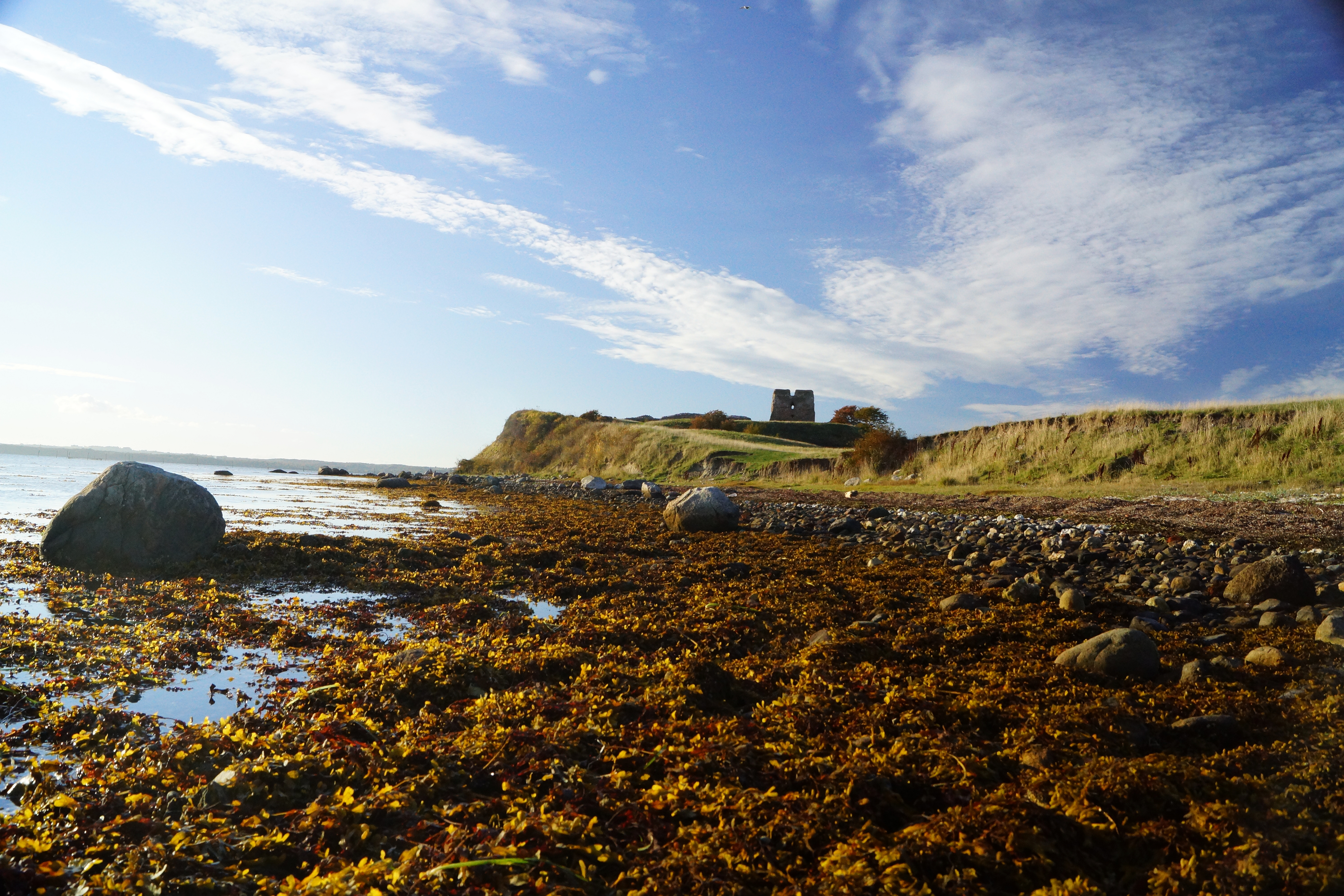 Egens Vig tang v. ruin